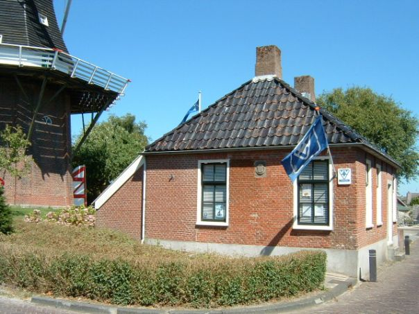 Sarrieshut te Uithuizen